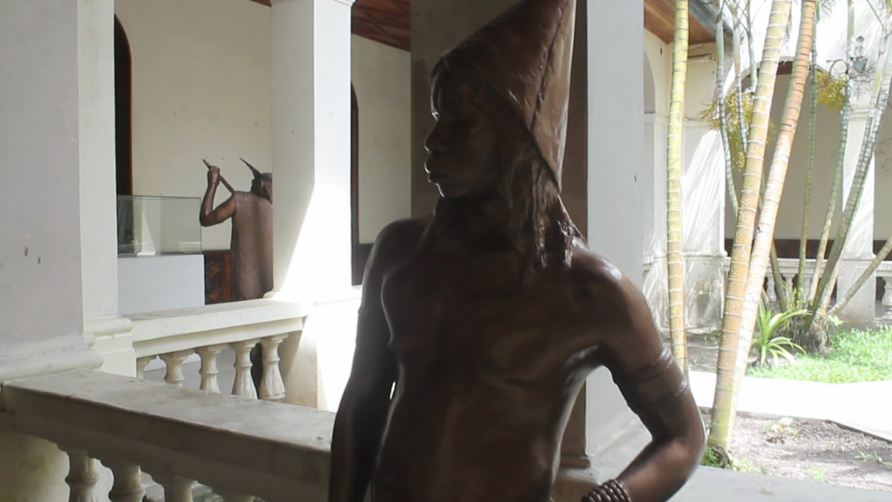 Estatua de un hombre iquito en el Museo Amazónico de Iquitos